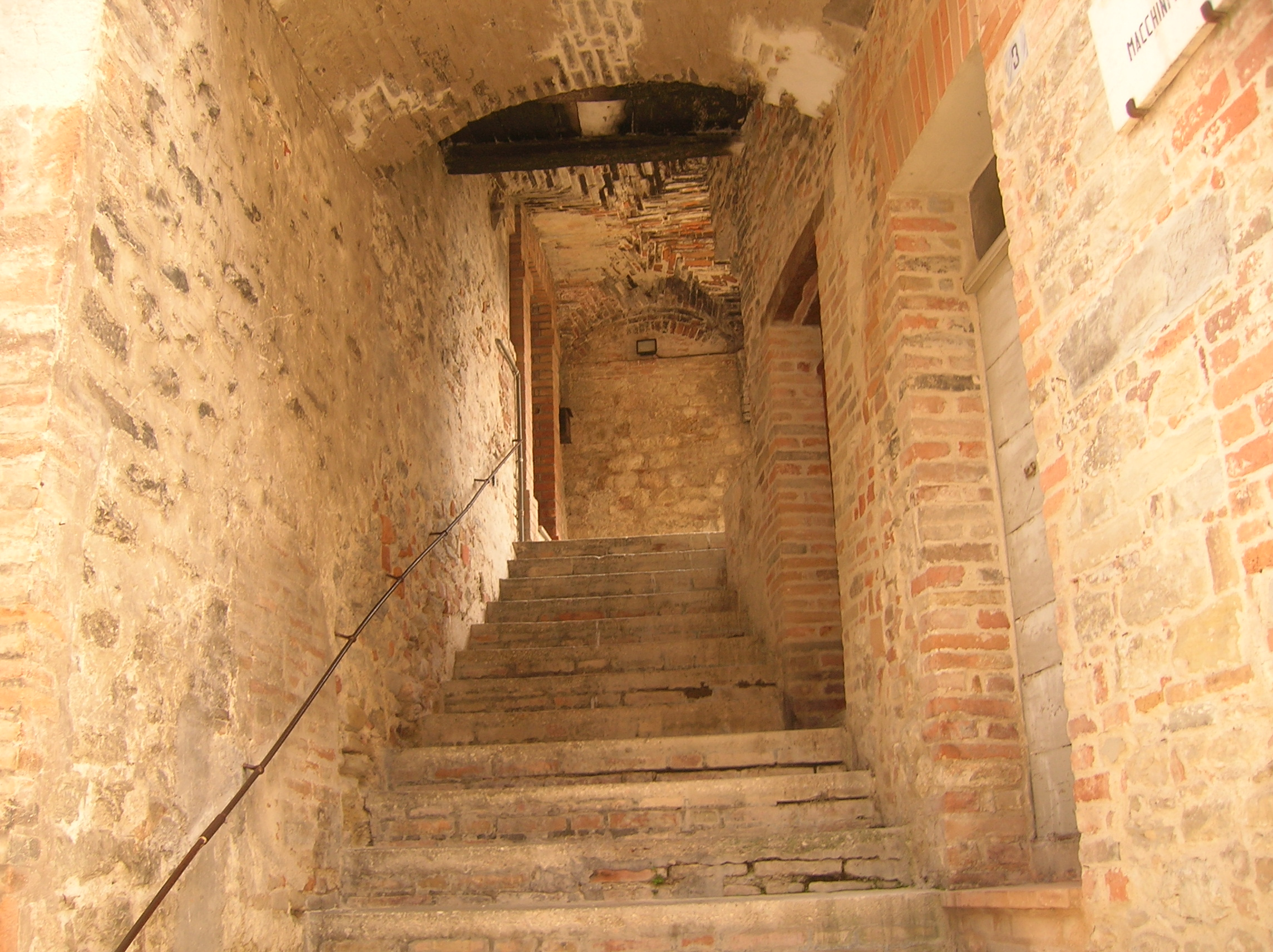 Vicolo Montefortino